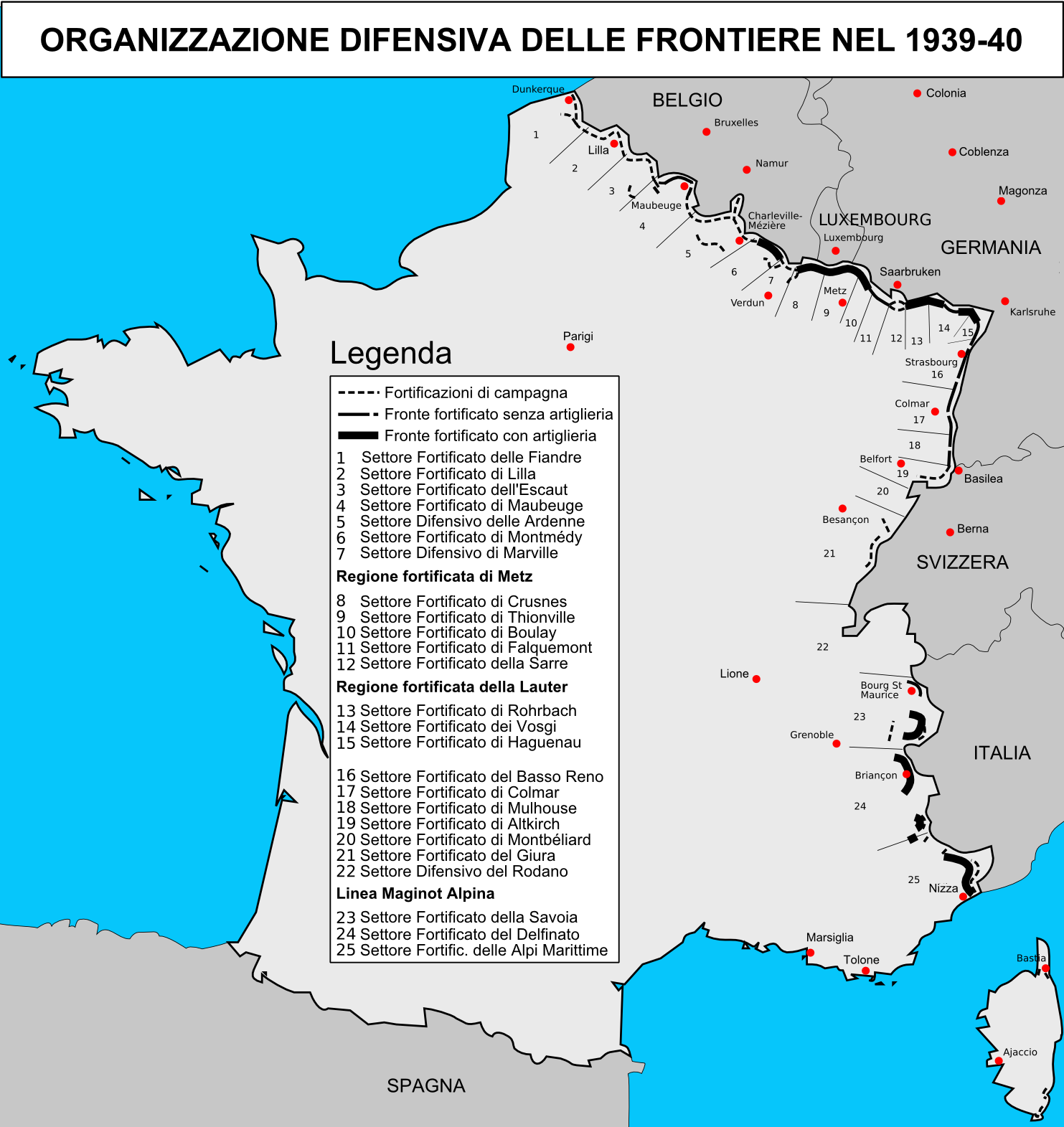 Mappa rappresentante l'organizzazione difensiva delle frontiere francesi nel 1939-1940